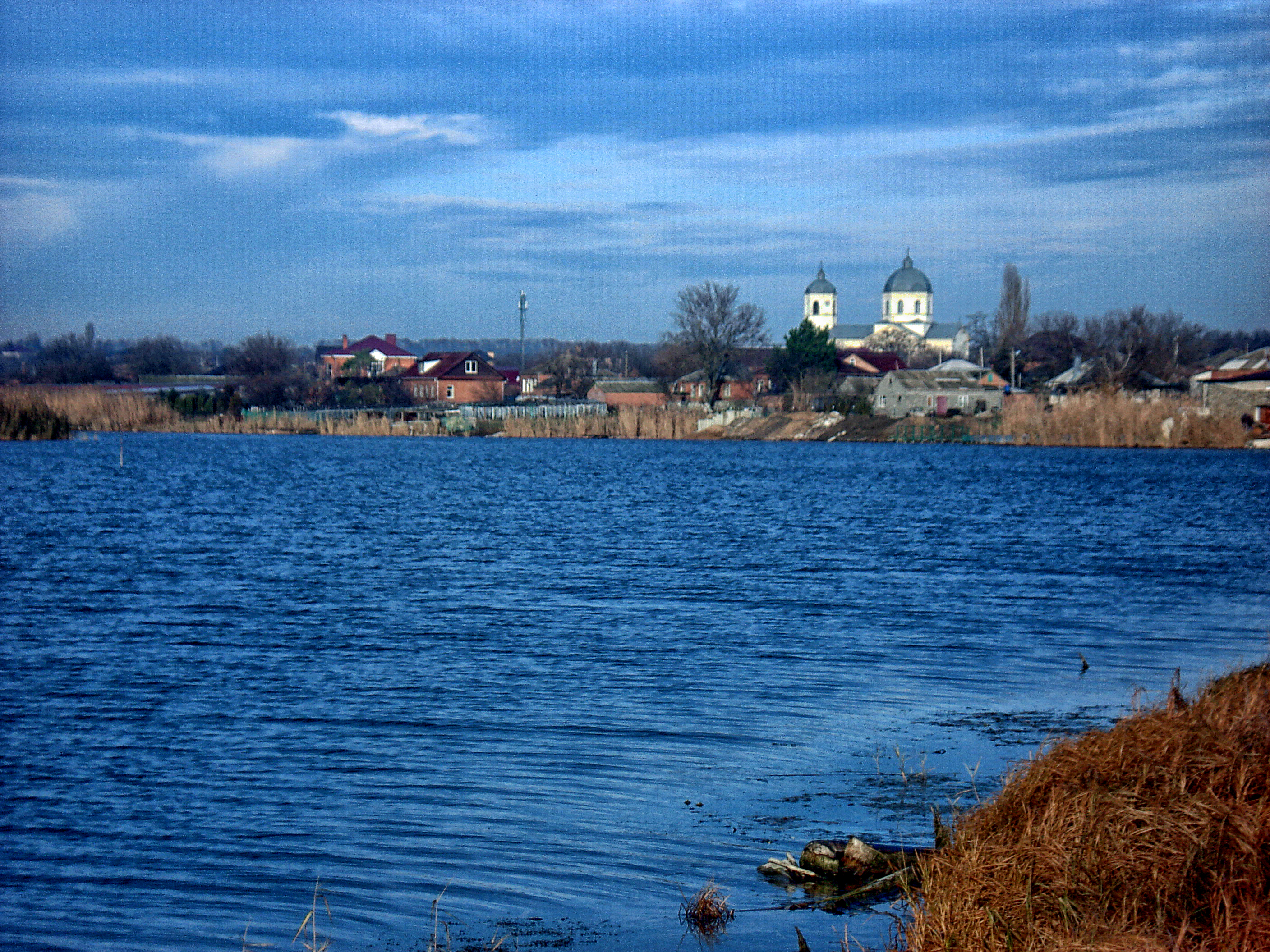 Церковь Аствацацин: ул. Ленина, 21, Большие Салы, Мясниковский район, Ростовская область